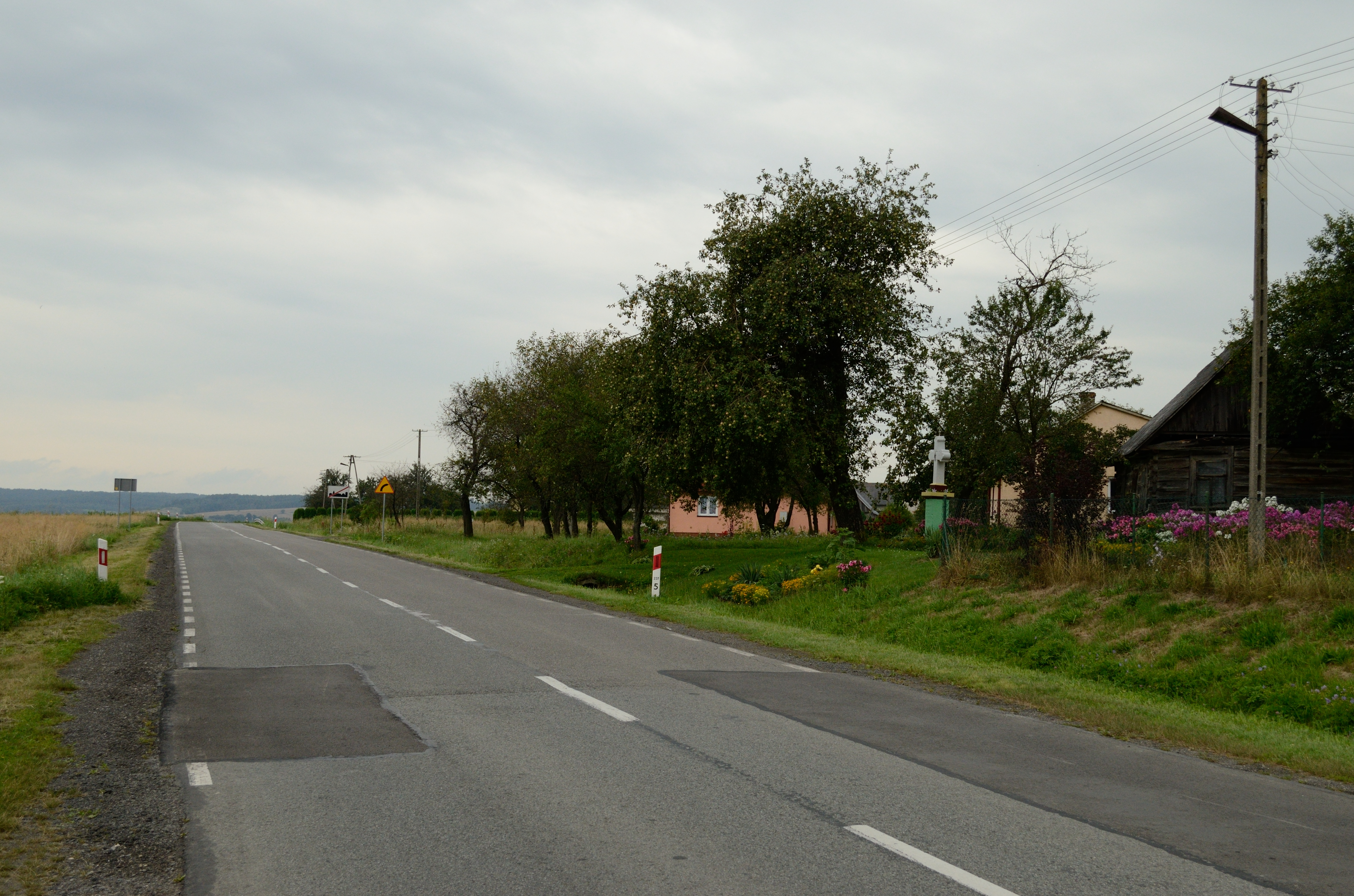 Gorajec-Zastawie - kapliczka